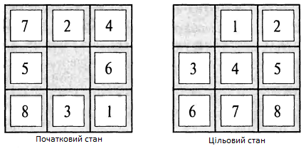 Пример игры в пятнашки, изображено одно из возможных начальных состояний и конечное состояние